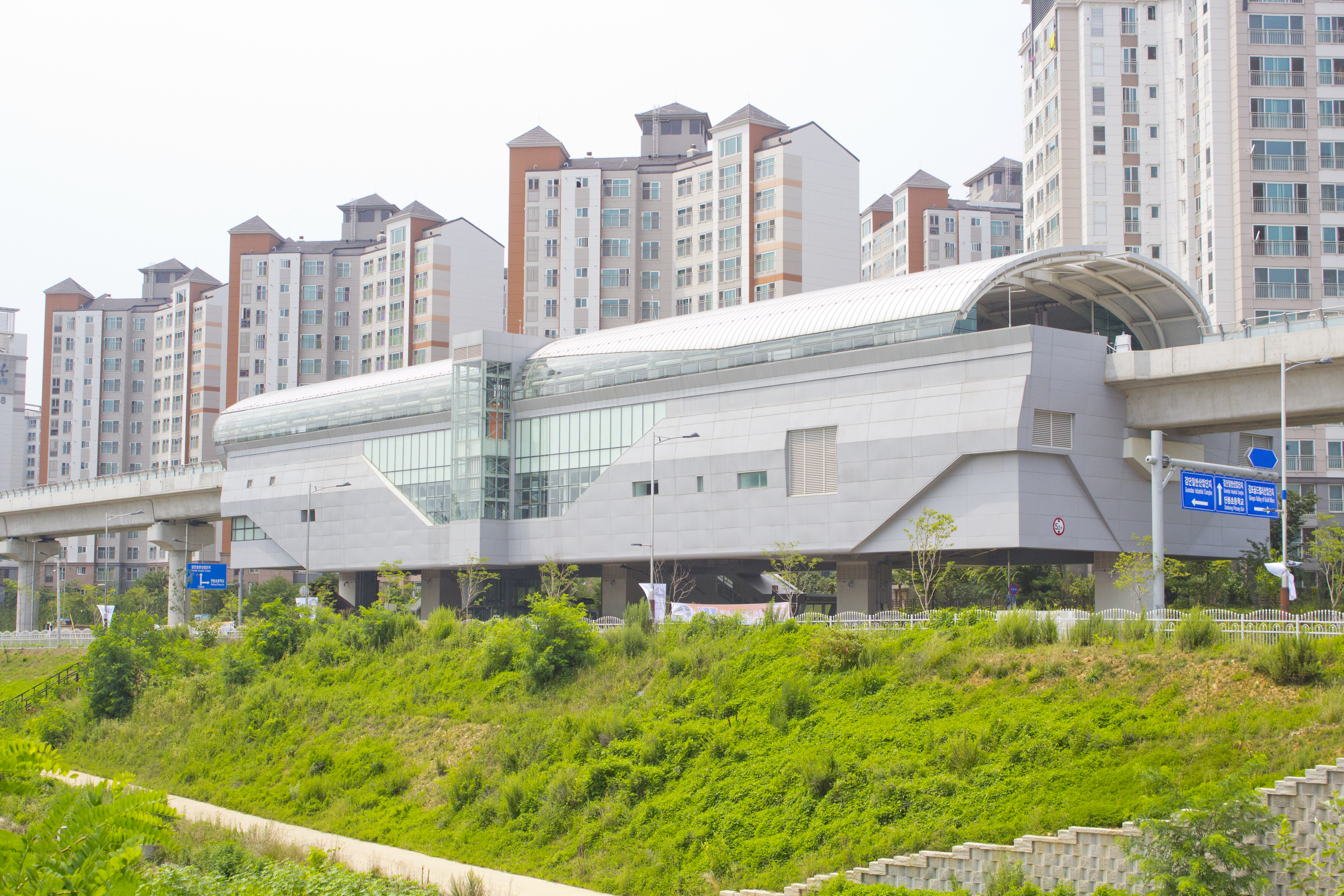 인천2호선 왕길역 역사외부 전경